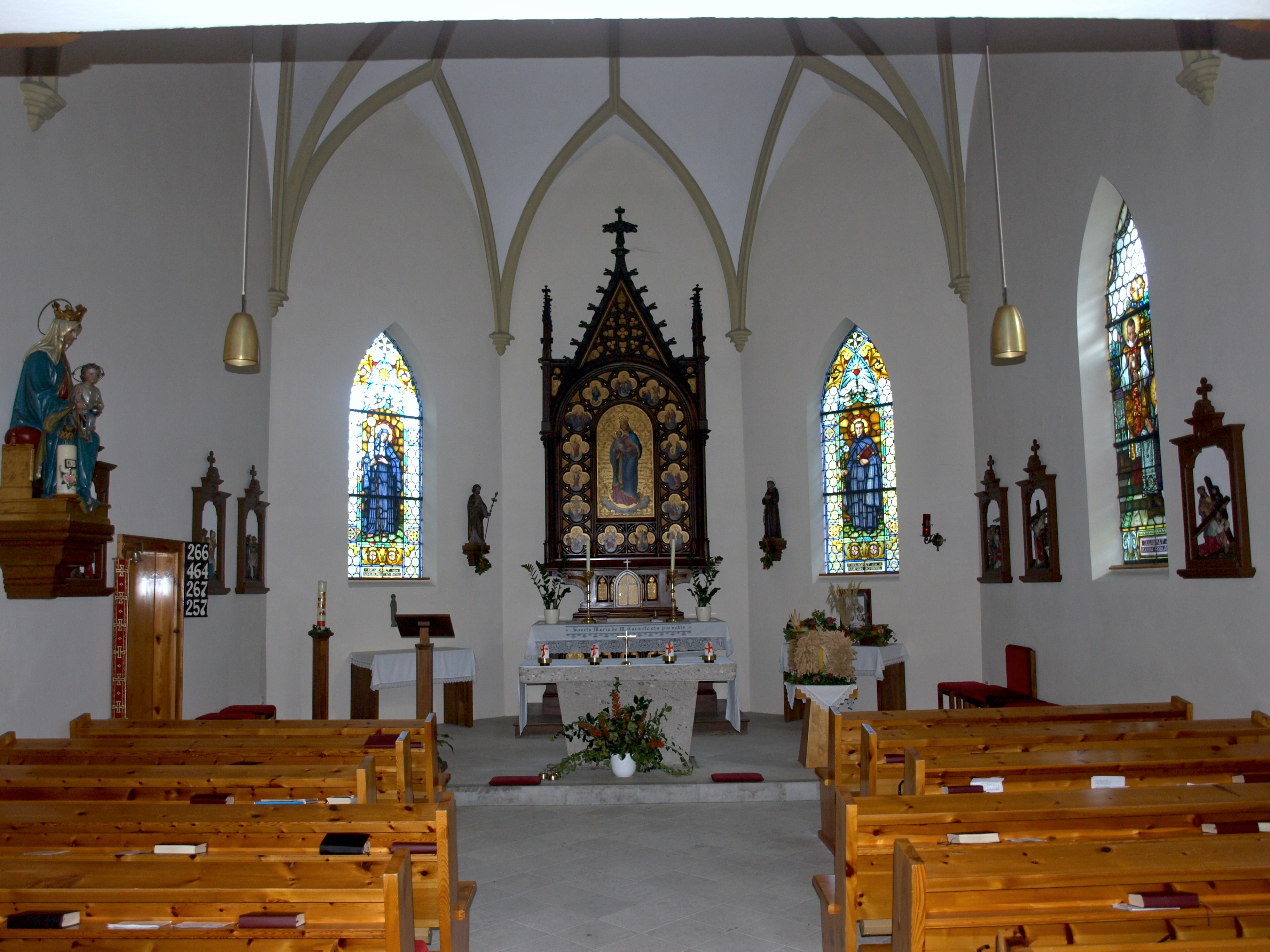 Kirche